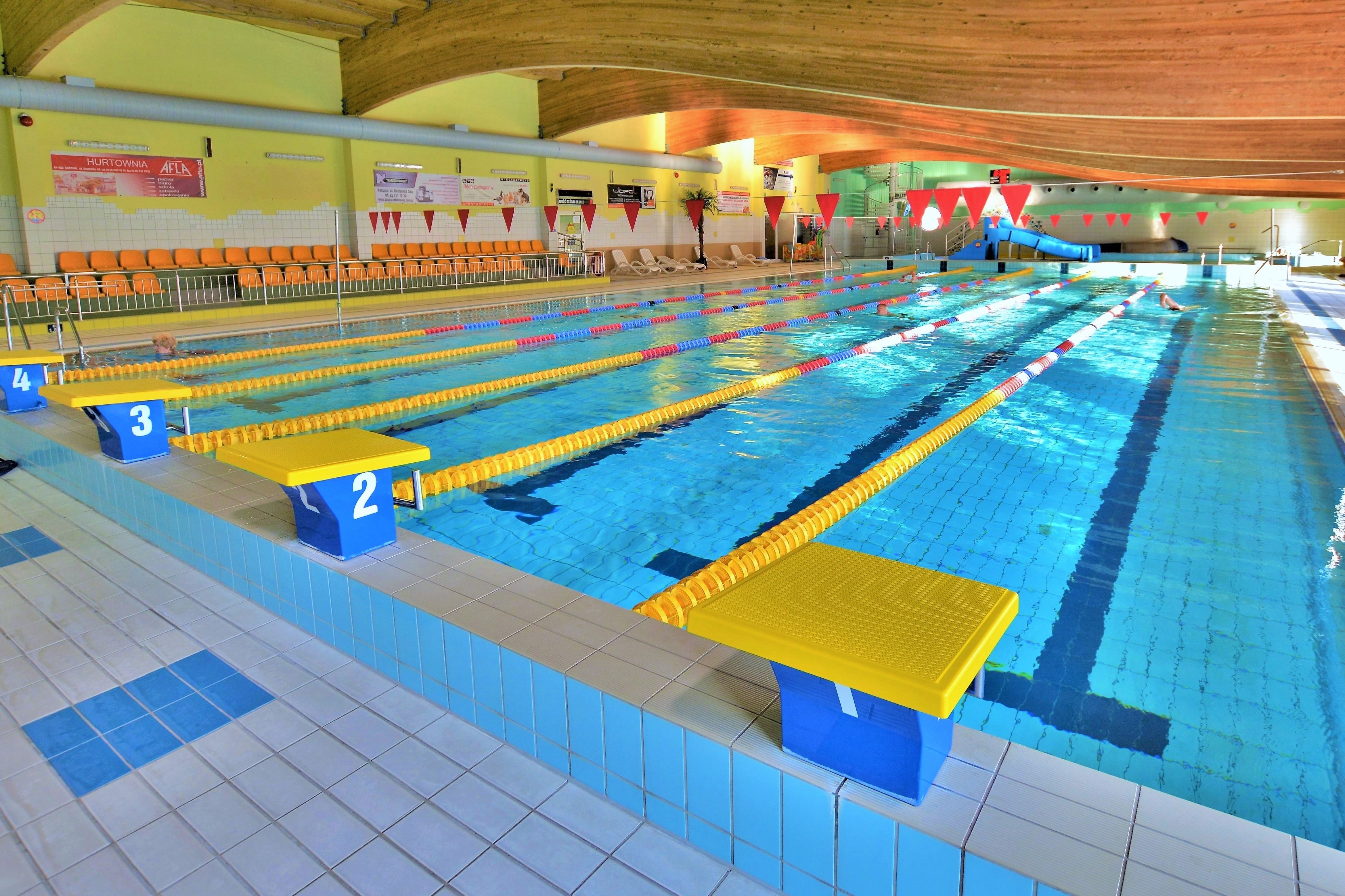 Kryta plywalnia w Kościanie